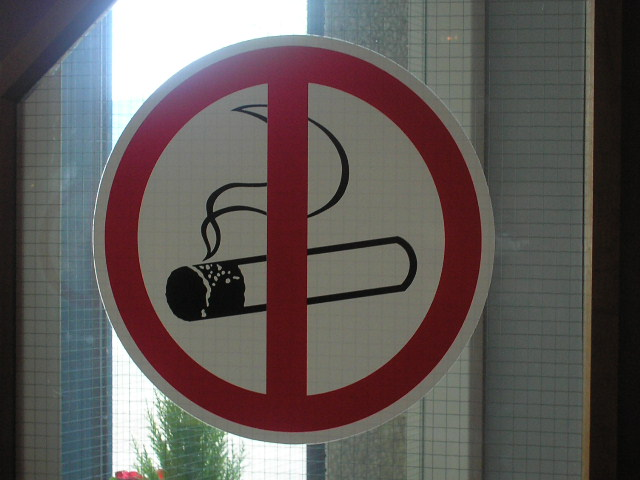 COVRA - verboden te roken (tabak)